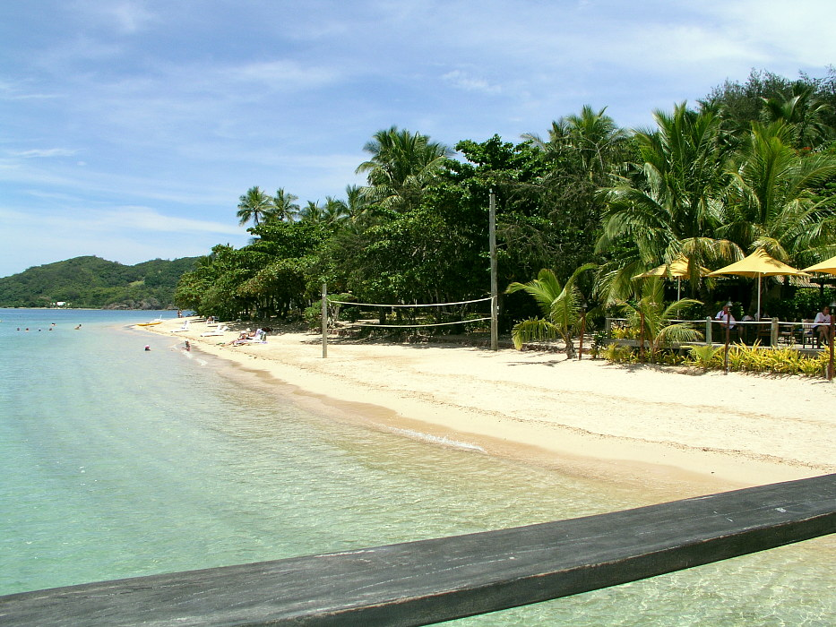 Malolo, Mamanucas - Fiji